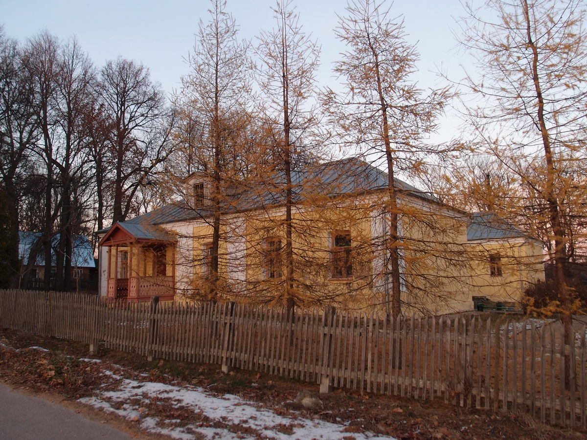 Дом Ильина Н.П. (Москва и Московская область, Солнечногорск, село Боблово)